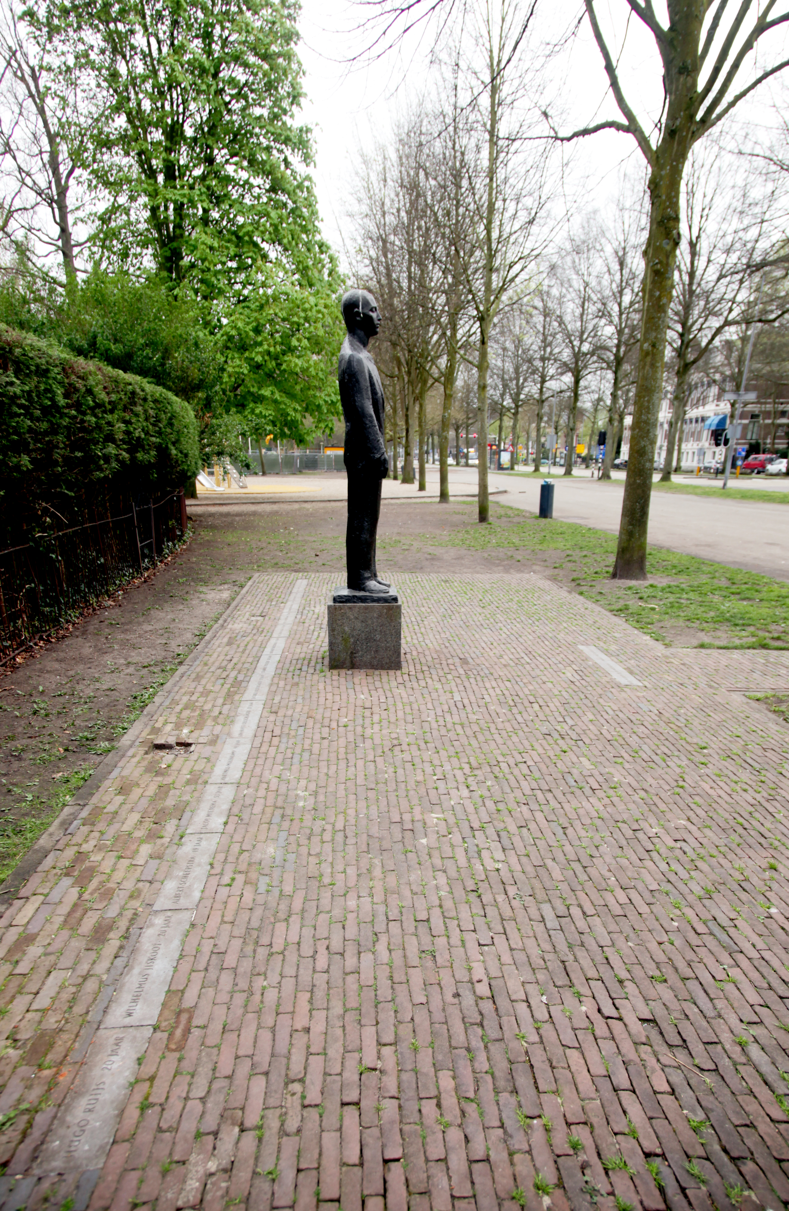 Monument met de naam van de slachtoffers achter het standbeeld en de voorkant het zin: " Hier werden zij op woensdag 7 maart 1945 gefusilleerd".